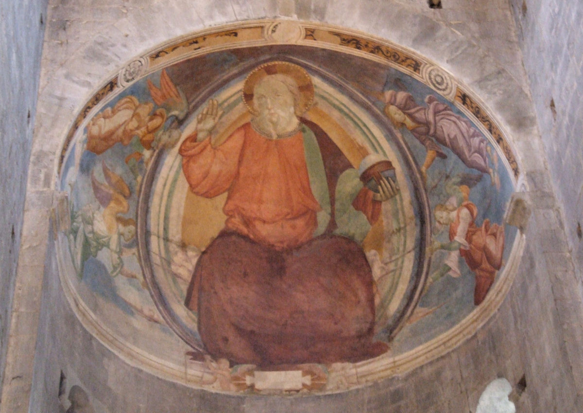 Chiesa Chiesa San Andria, Pistoia, Italy